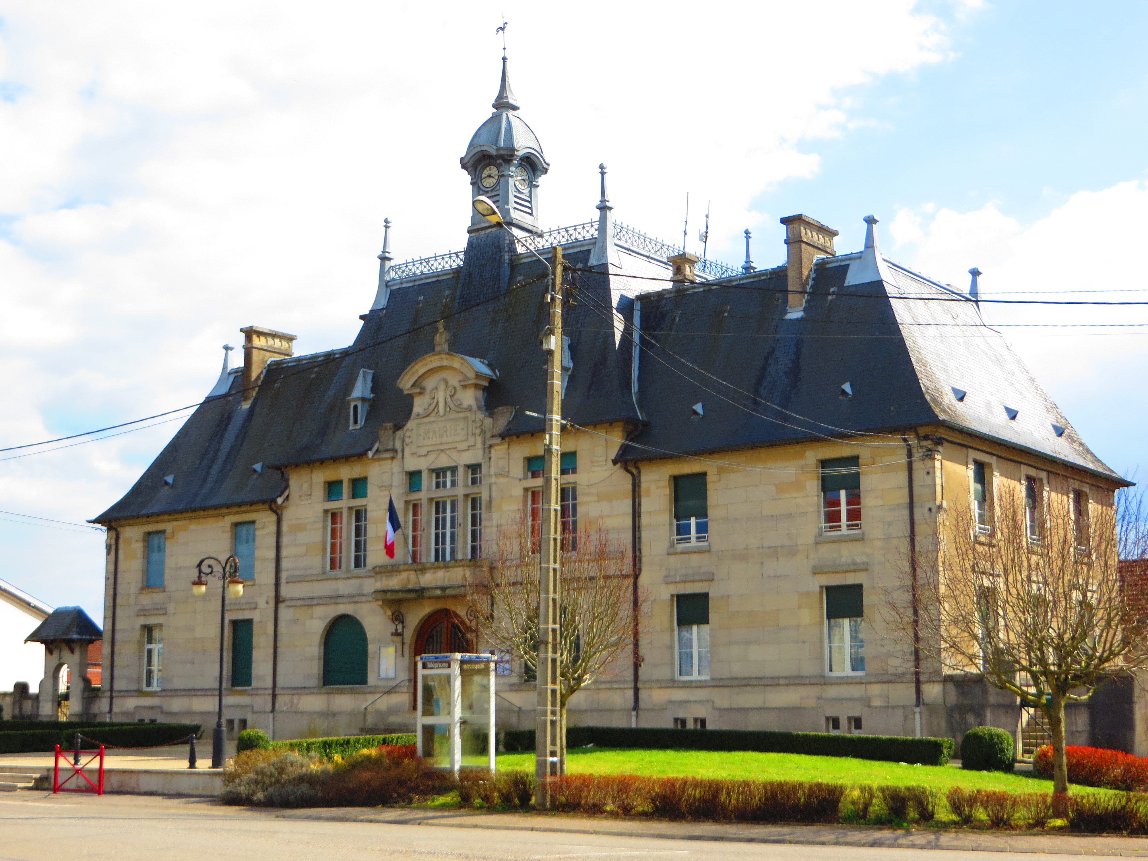 Laheycourt la mairie